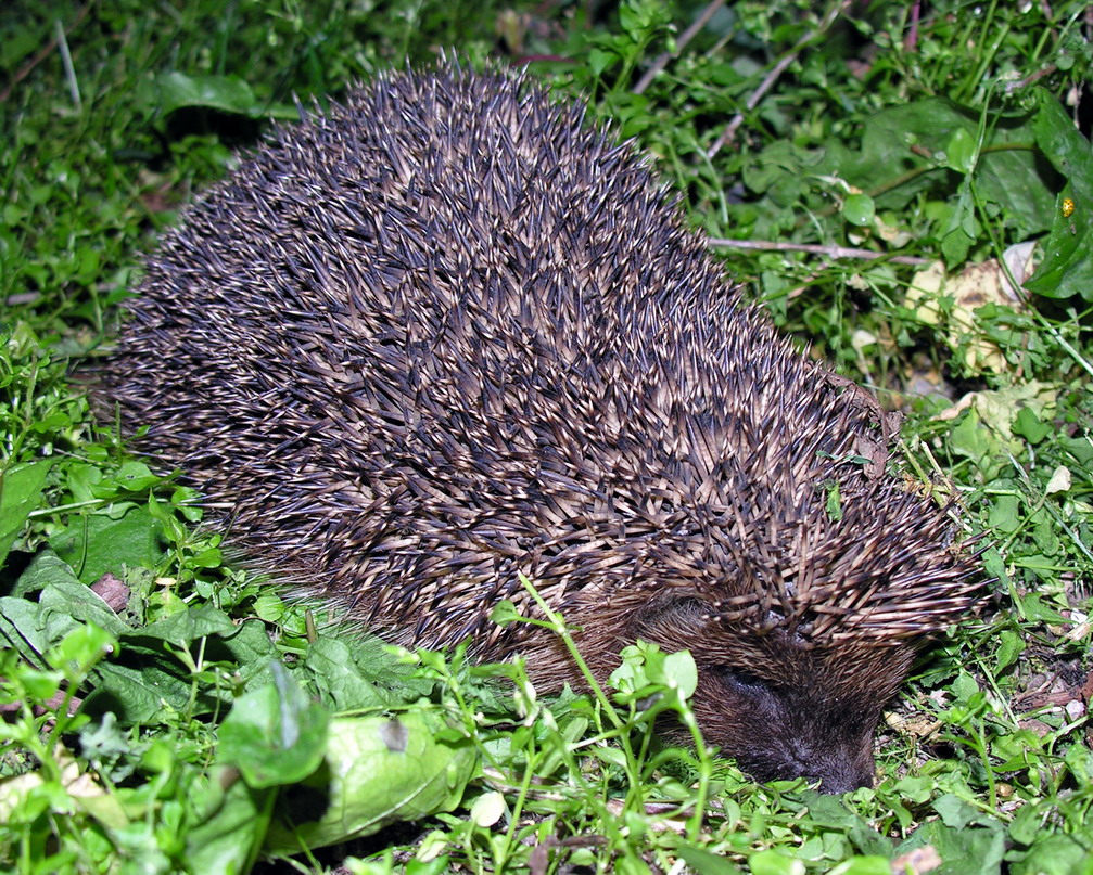 Ežys (Erinaceus europaeus) Šeima. Ežiniai (Erinaceidae) Foto: Algirdas, 2006 m. liepos 16 d., Lietuva